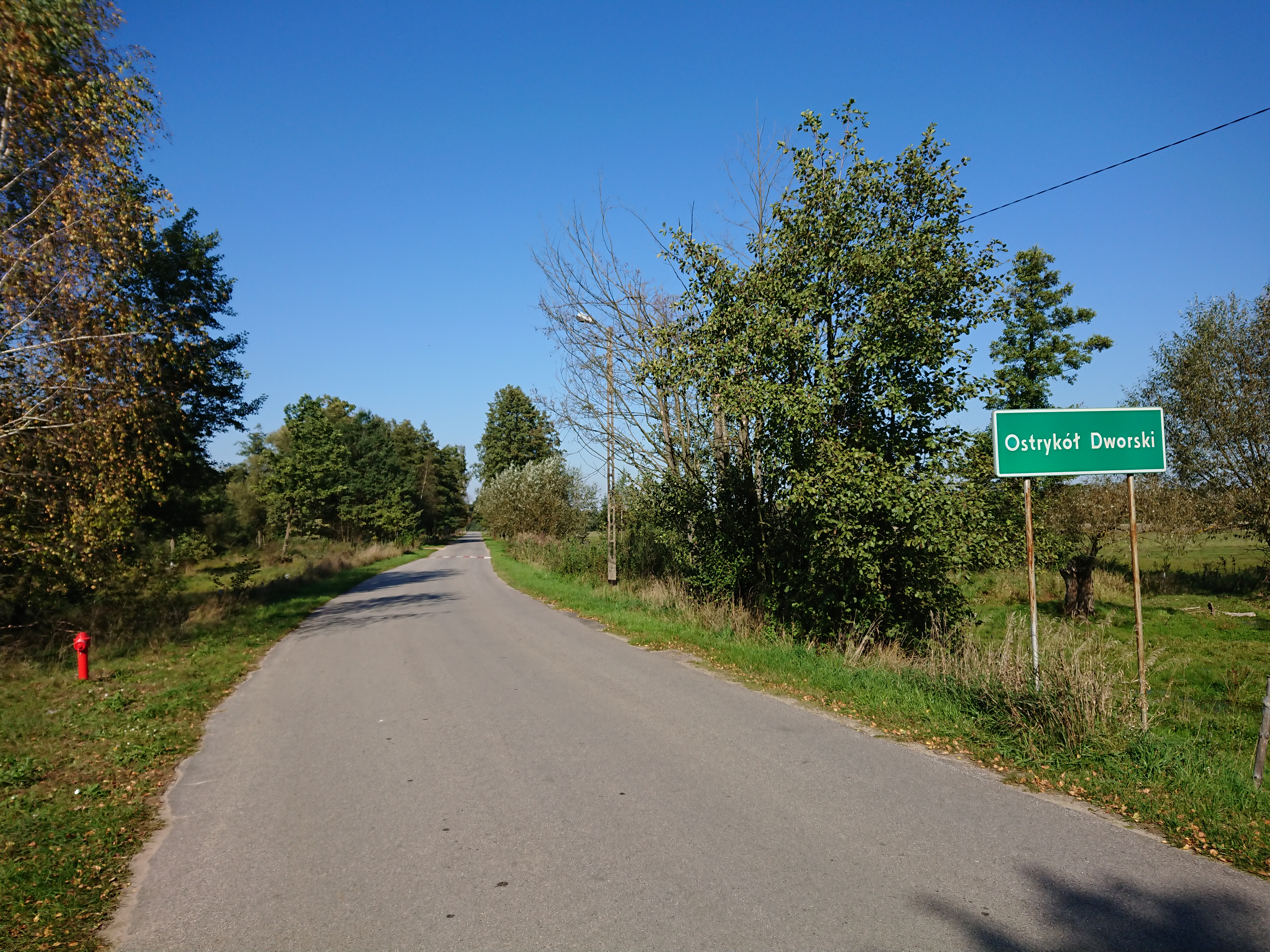 Wjazd do Ostrykołu Dworskiego